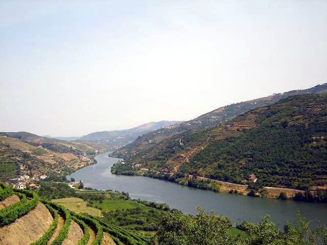 Rio Douro, Rio Duero, Duero river.